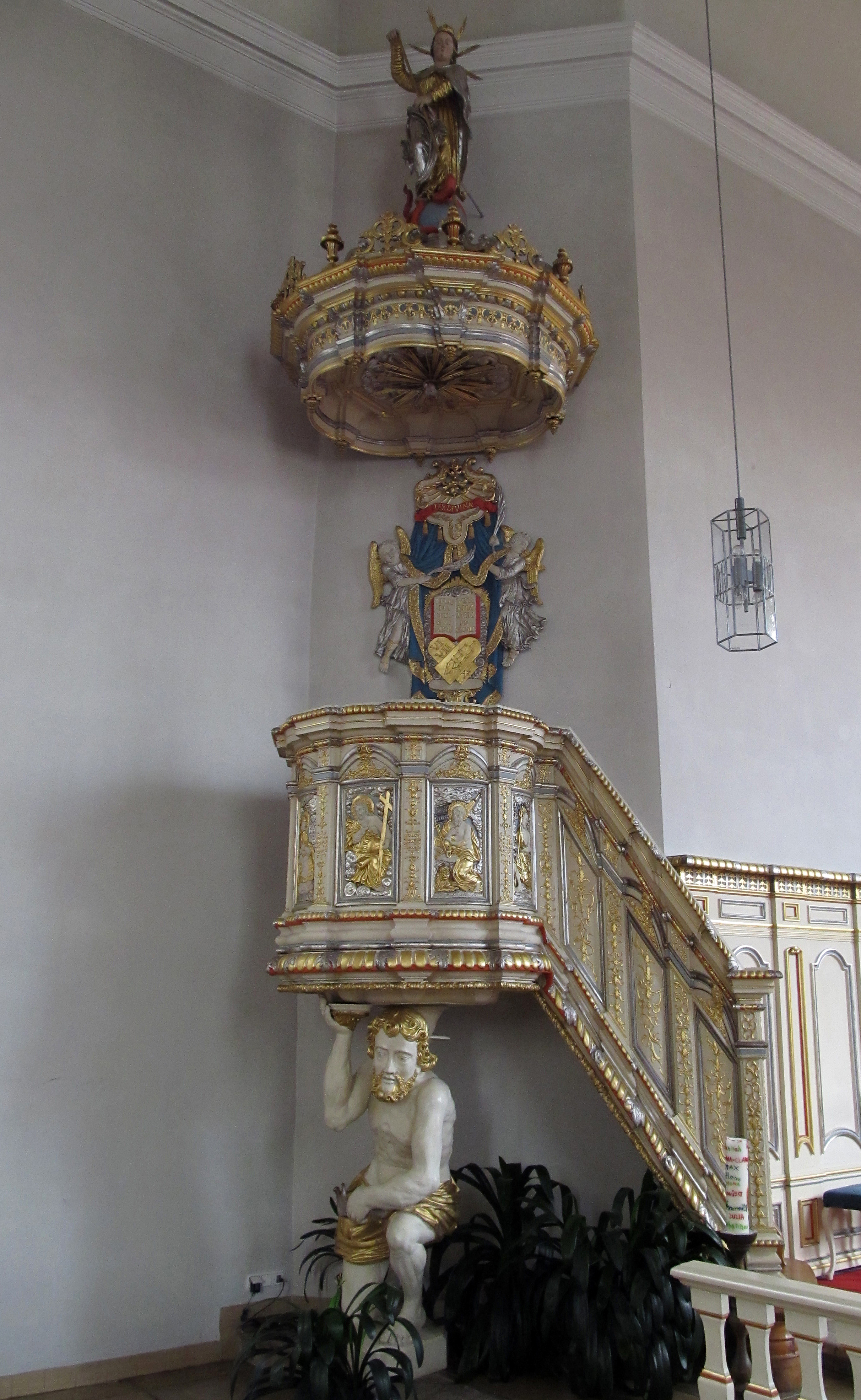 Kanzel der katholischen Pfarrkirche St. Markus in Reinheim, Gemeinde Gersheim, Saarland